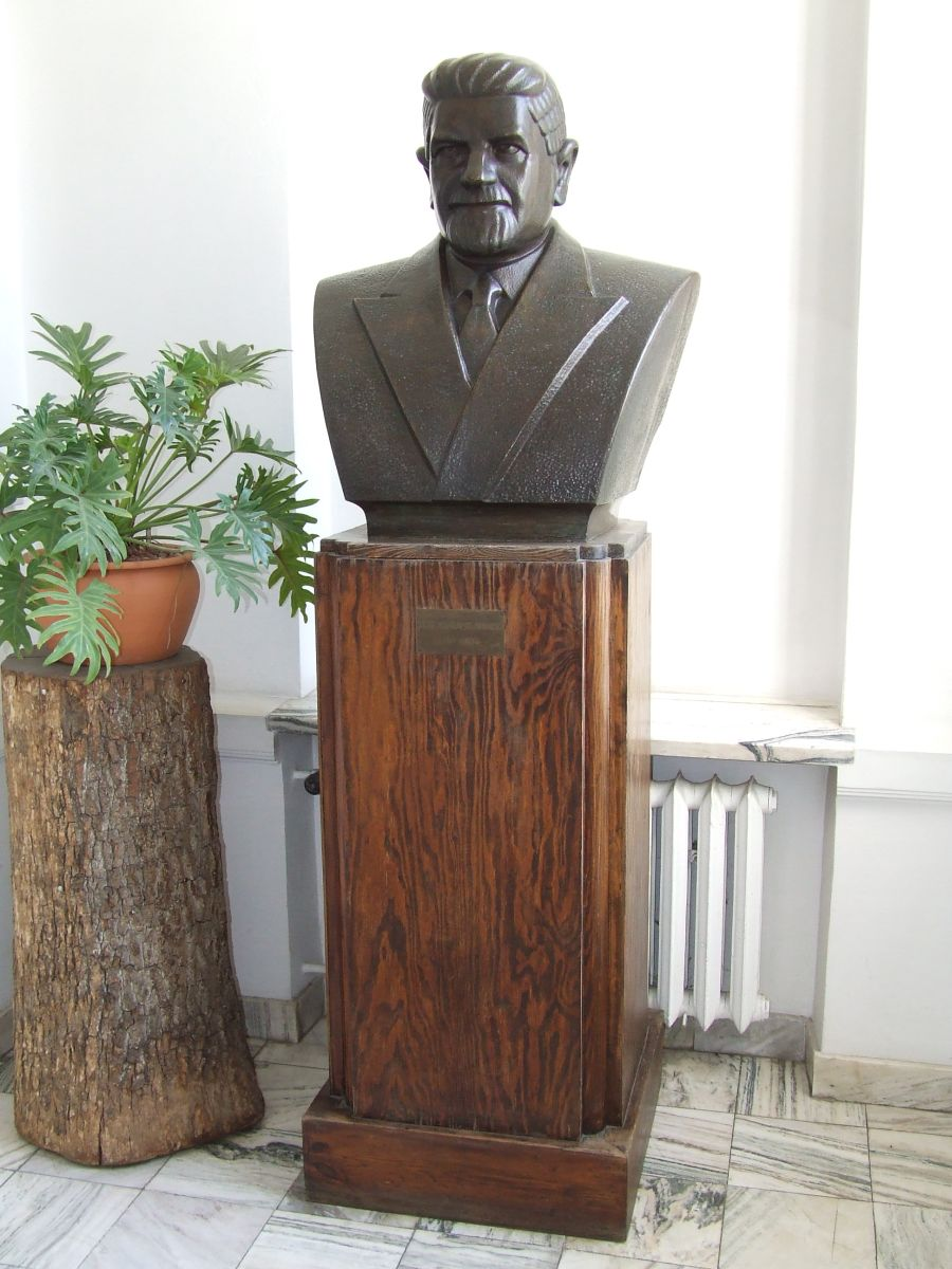 Pałac Juliana Ursyna Niemcewicza, obecnie rektorat SGGW, popiersie Józefa Mikułowskiego-Pomorskiego w pałacu